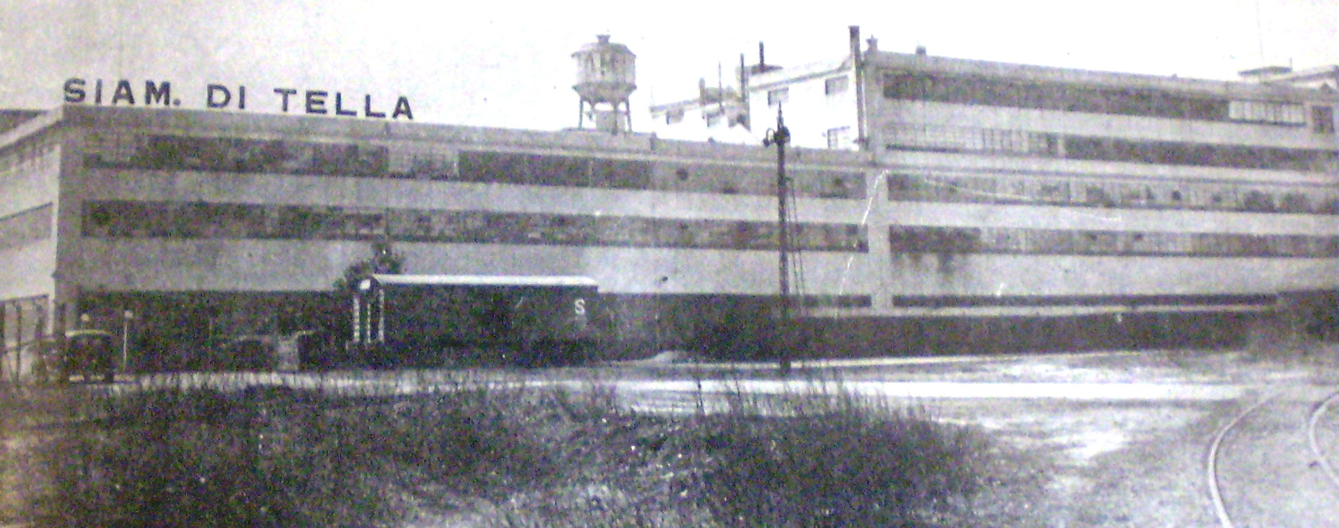 Planta industrial de Siam Di Tella en Piñeyro, partido de Avellaneda, provincia de Buenos Aires, Argentina.